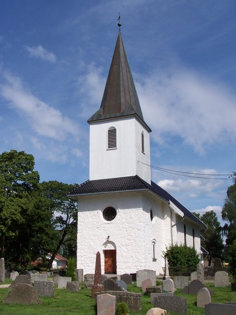 Ski kirke i Ski kommune, Akershus, Norway